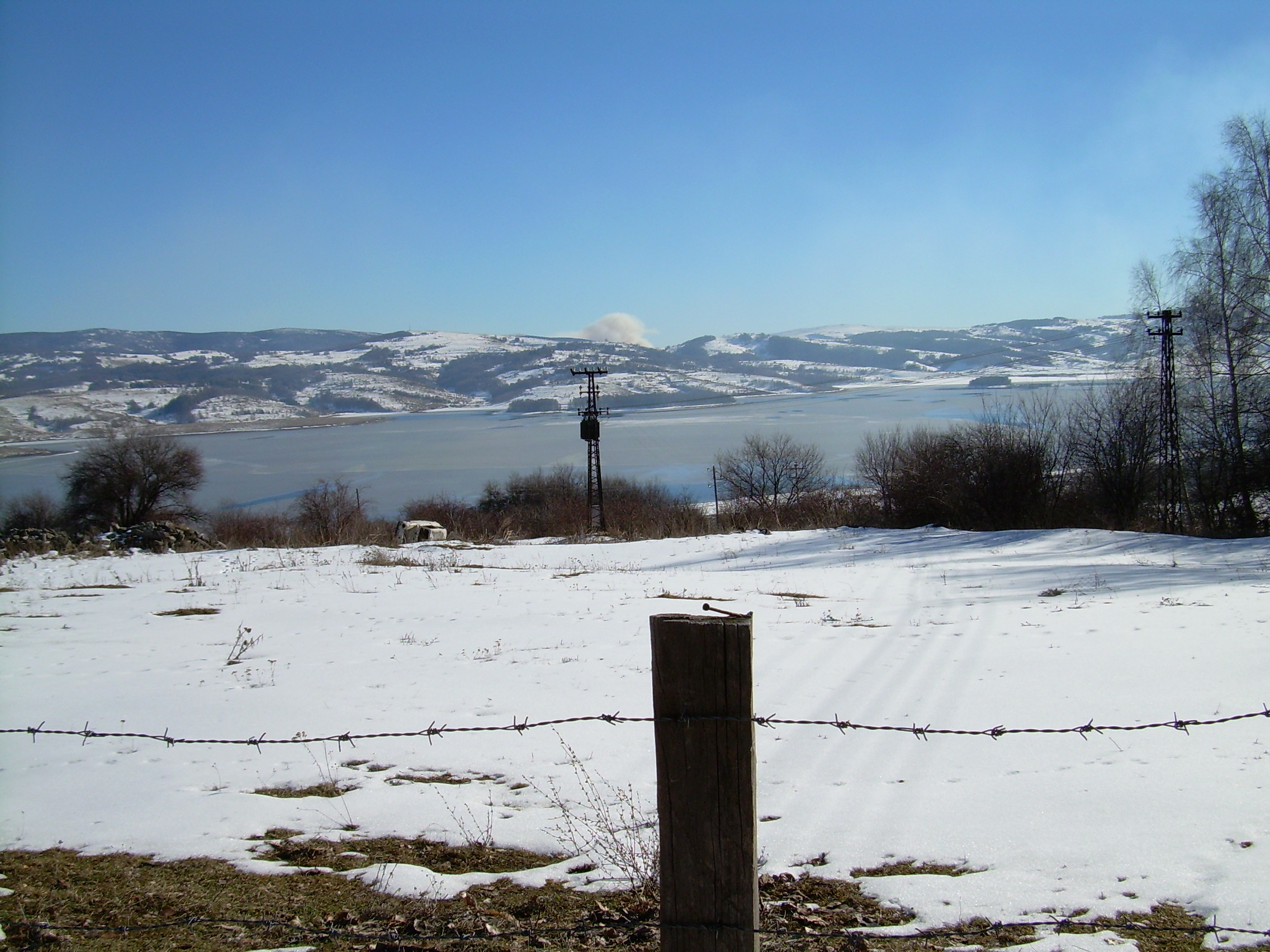 Vlasina Stojkovićeva, pogled s Vlasine Rida